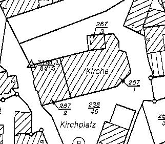 Katasterplan der Laurentiuskirche zu Dirmstein